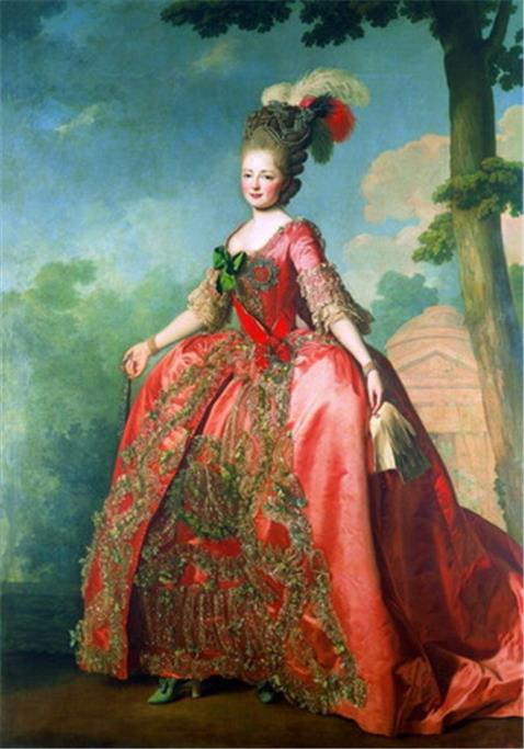 Alexander Roslin (1718–1793): Großfürstin, später Kaiserin Marija Fjodorowna von Russland geborene Sophia Dorothea von Württemberg (1759–1828), um 1777, Pawlowsk.